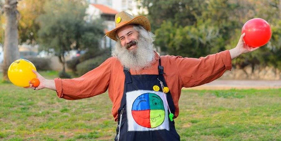 סבי נחמן sabi nahman